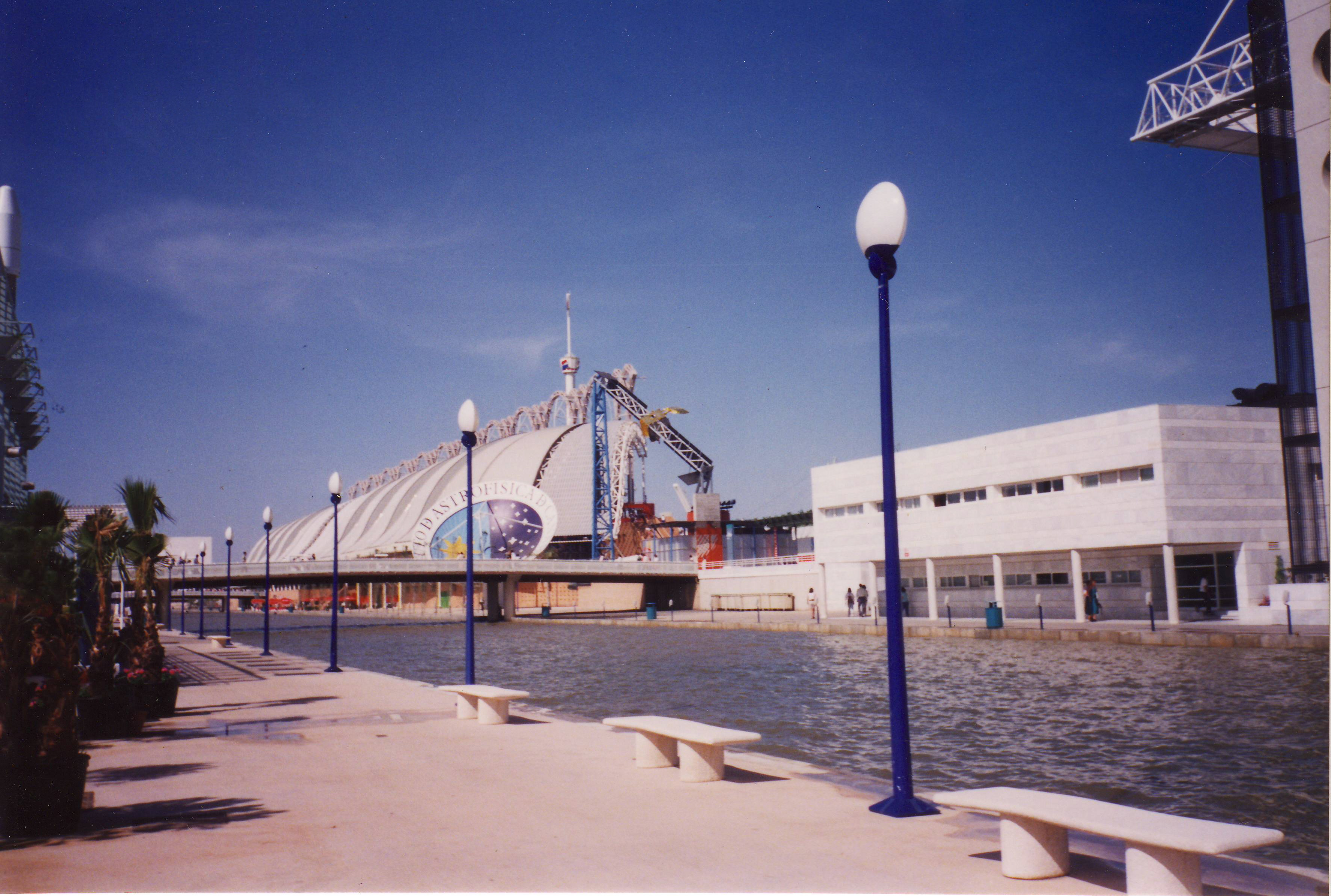 Exposición Universal Sevilla 92. Viaje en Abril, a la derecha el auditorio, a al izquierda el pabellón del futuroexpo 92 01